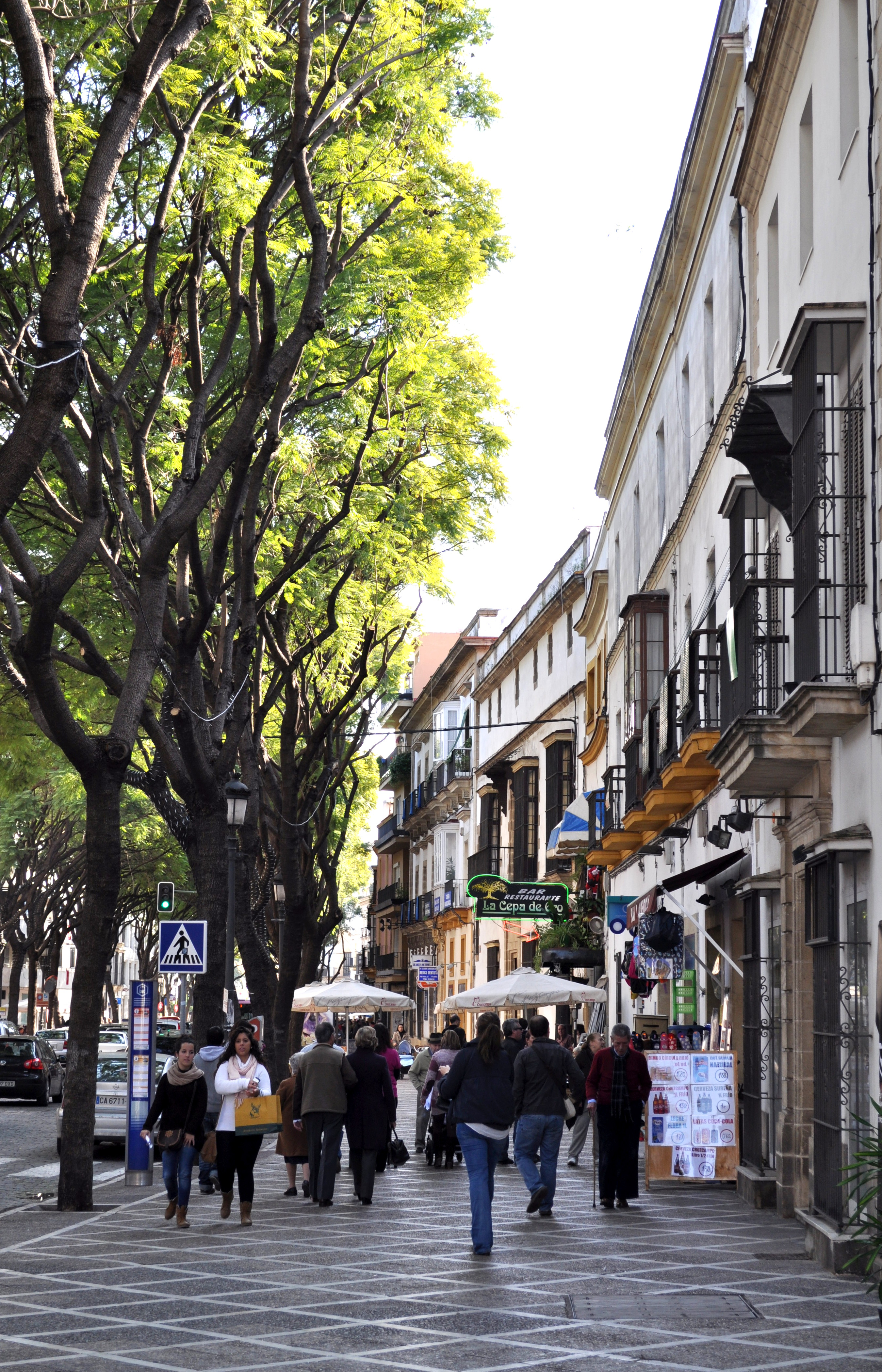 Calle Porvera, Jerez de la Frontera